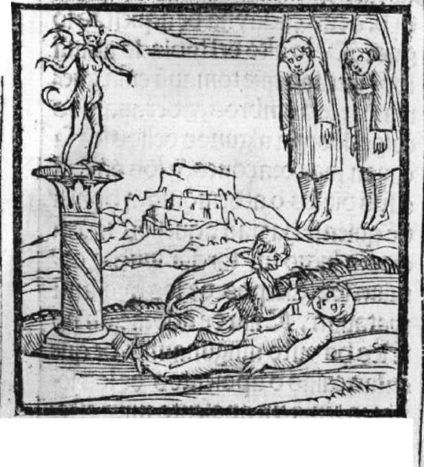 Рисунок из Хроники Перу, 1553